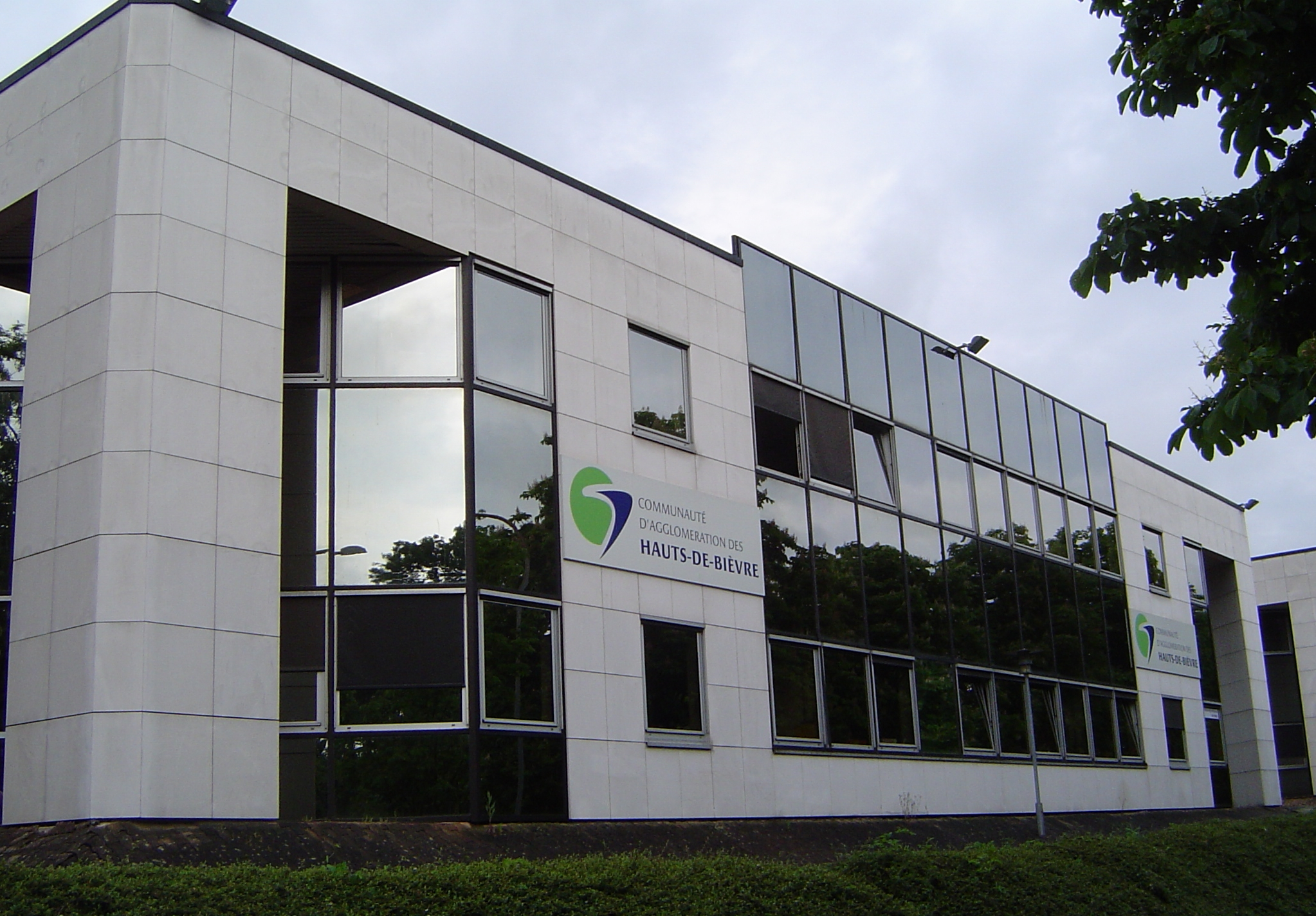 Antony